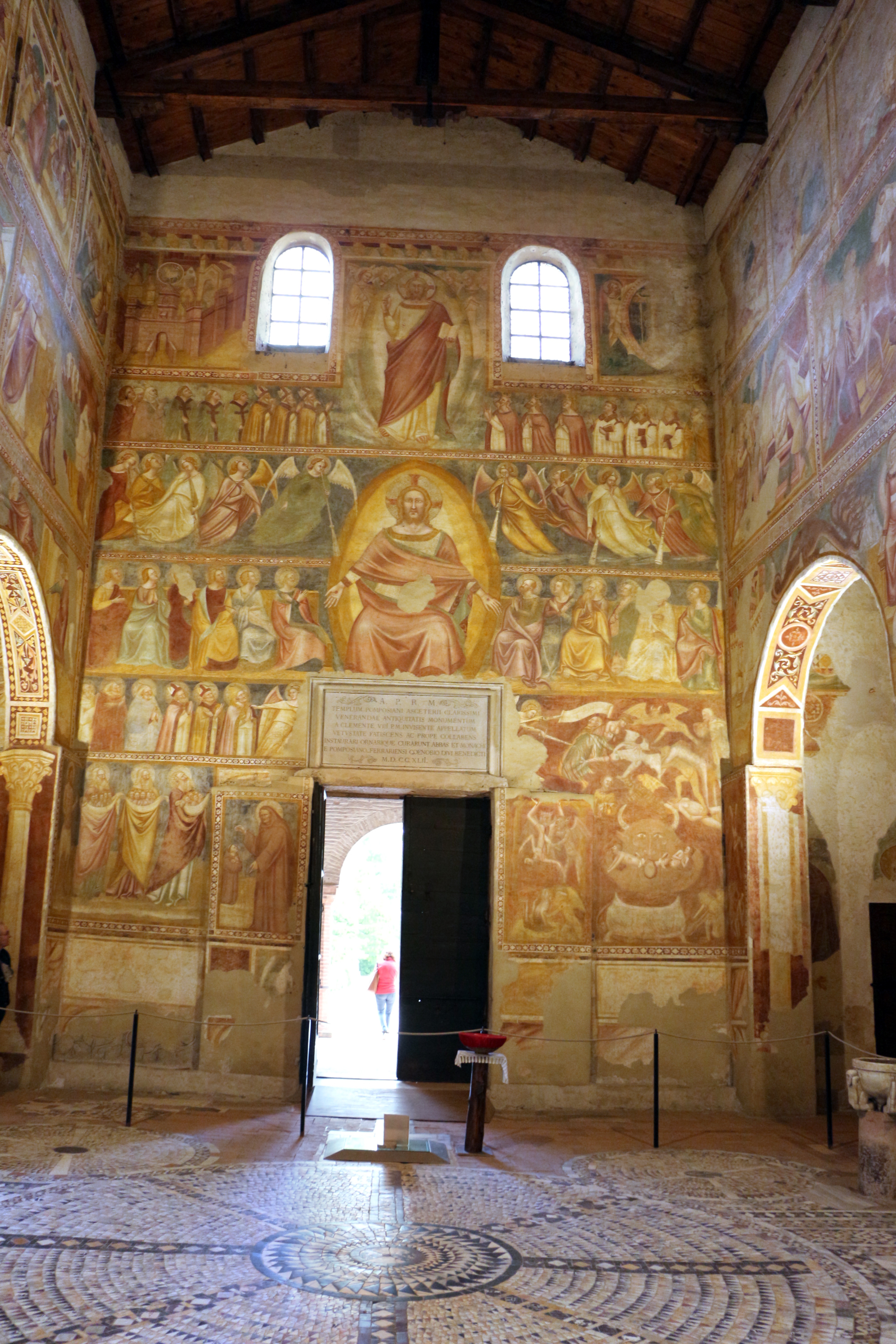 Abbazia di Pomposa This is a photo of a monument which is part of cultural heritage of Italy.